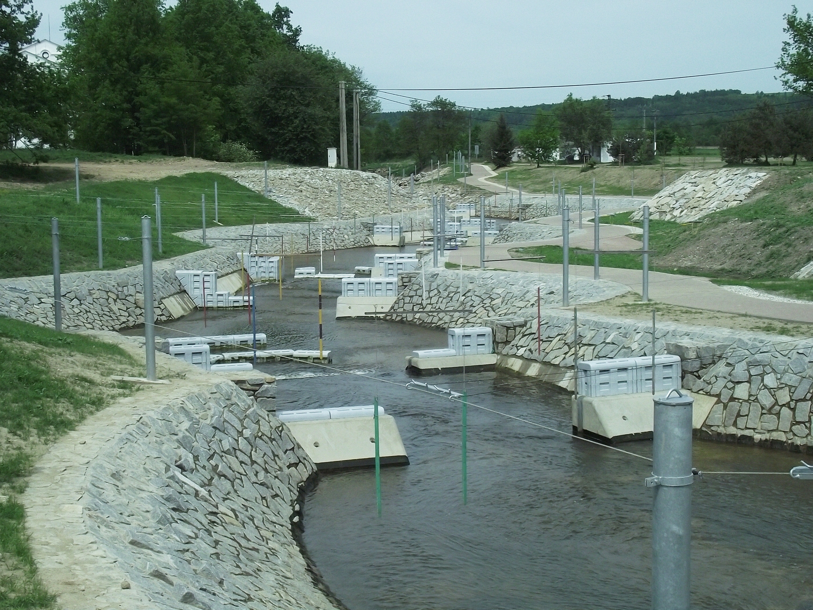 SK vodní slalom České Budějovice